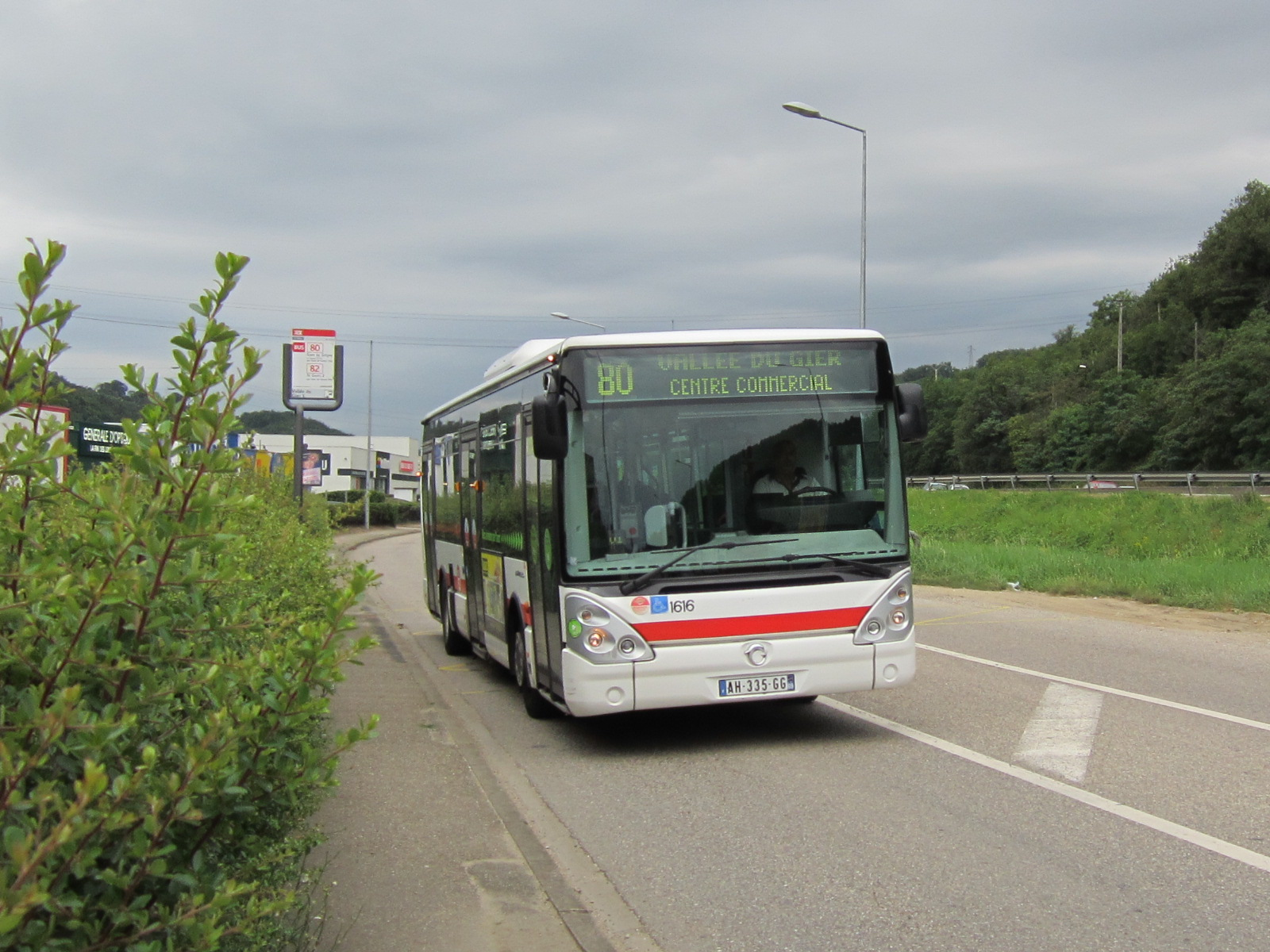 Irisbus Citelis 12 n°1616 sur la ligne 80 du réseau TCL, à Givors Vallée du Gier (près de Lyon).